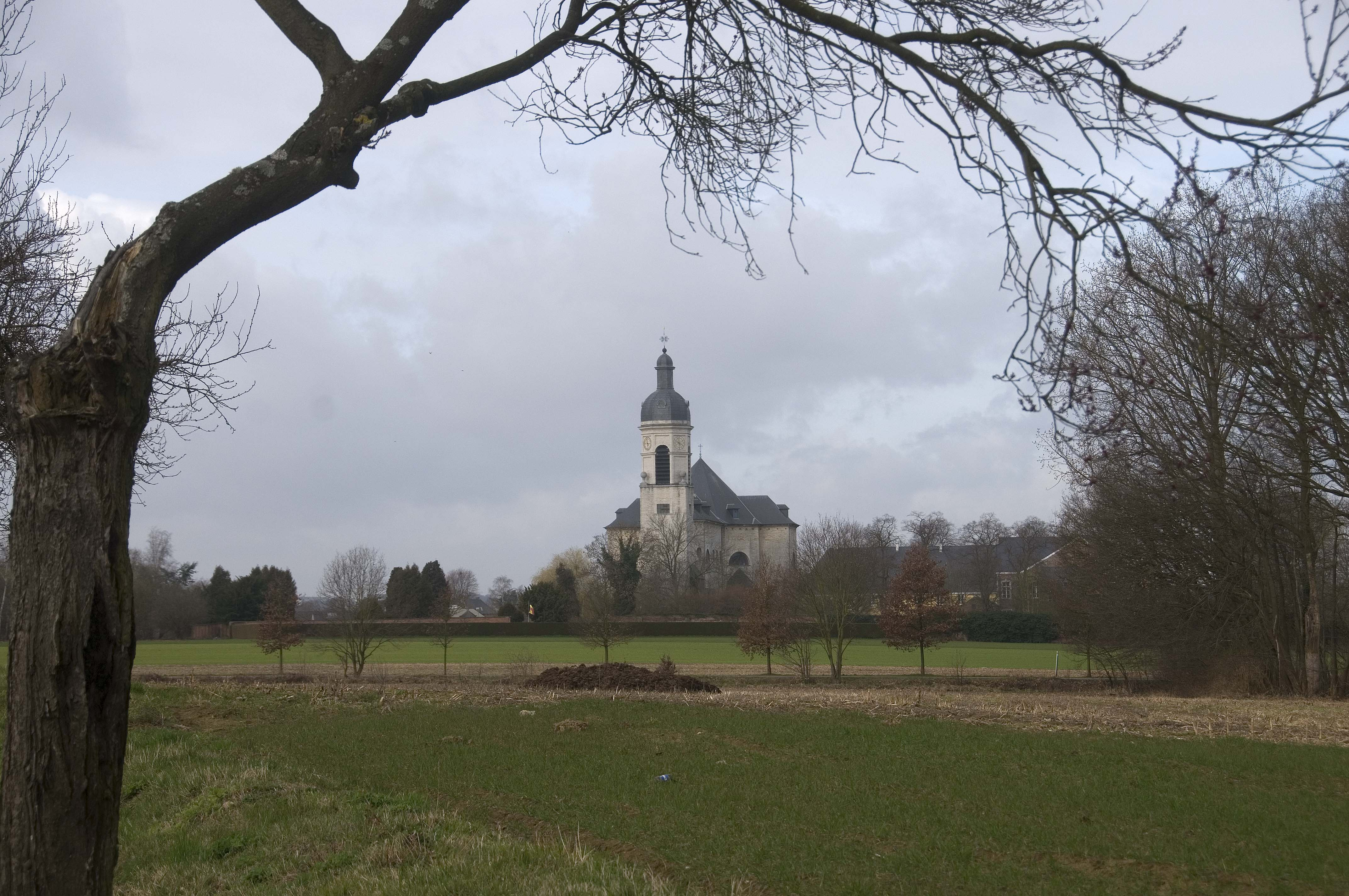 De abdij vormde zeven eeuwen lang het kader voor het dagelijkse leven van de benedictijnenmonniken van Vlierbeek (1125-1796). Gesticht door de monniken van Affligem die het domein hebben gekregen. Zij maakten de omliggende gronden vruchtbaar en speelden een grote rol in de overdracht van kennis en religie in de streek. De abdijgebouwen verhalen een stuk architectuurgeschiedenis en roepen de herinnering op aan het leven van vele generaties monniken, met momenten van bloei en verval, van geluk en tegenspoed. Vlierbeek is een bevoorrechte plaats met een bezondere sfeer die nog steeds de rust van de vroegere monnikengemeenschap uitstraalt. In 1776 werd de inmiddels vervallen 17e eeuwse kerk vervangen door de huidige neoclassicistische kerk.